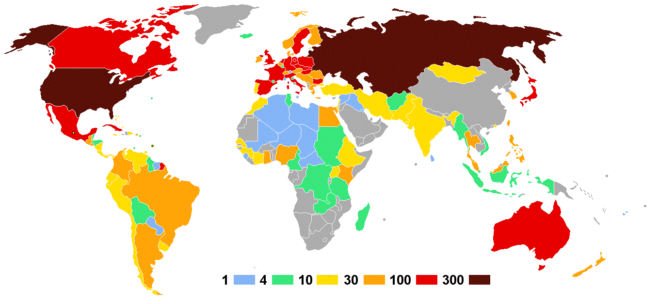 Olympische Sommerspiele 1968 — Anzahl der Athleten